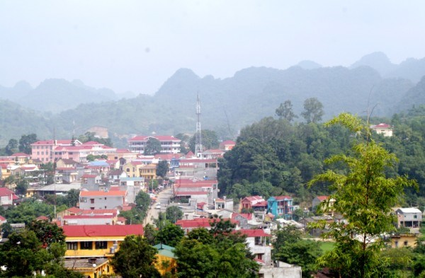 Trung Tâm Thị Trấn Đông Khê